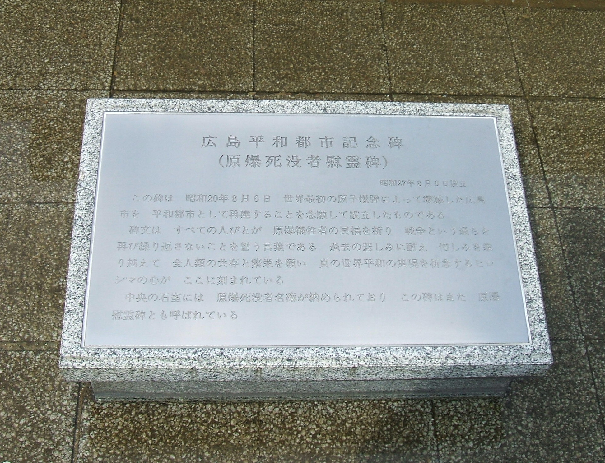 広島平和記念公園の原爆慰霊碑の慰霊文の解説を日本語でした石碑。ただし現在はアクリル板によるものに変更されたため、現存しない。